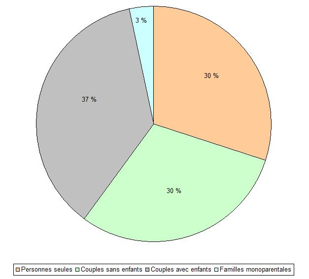 Composition des foyers de Couzon (Allier, France) en 2007.